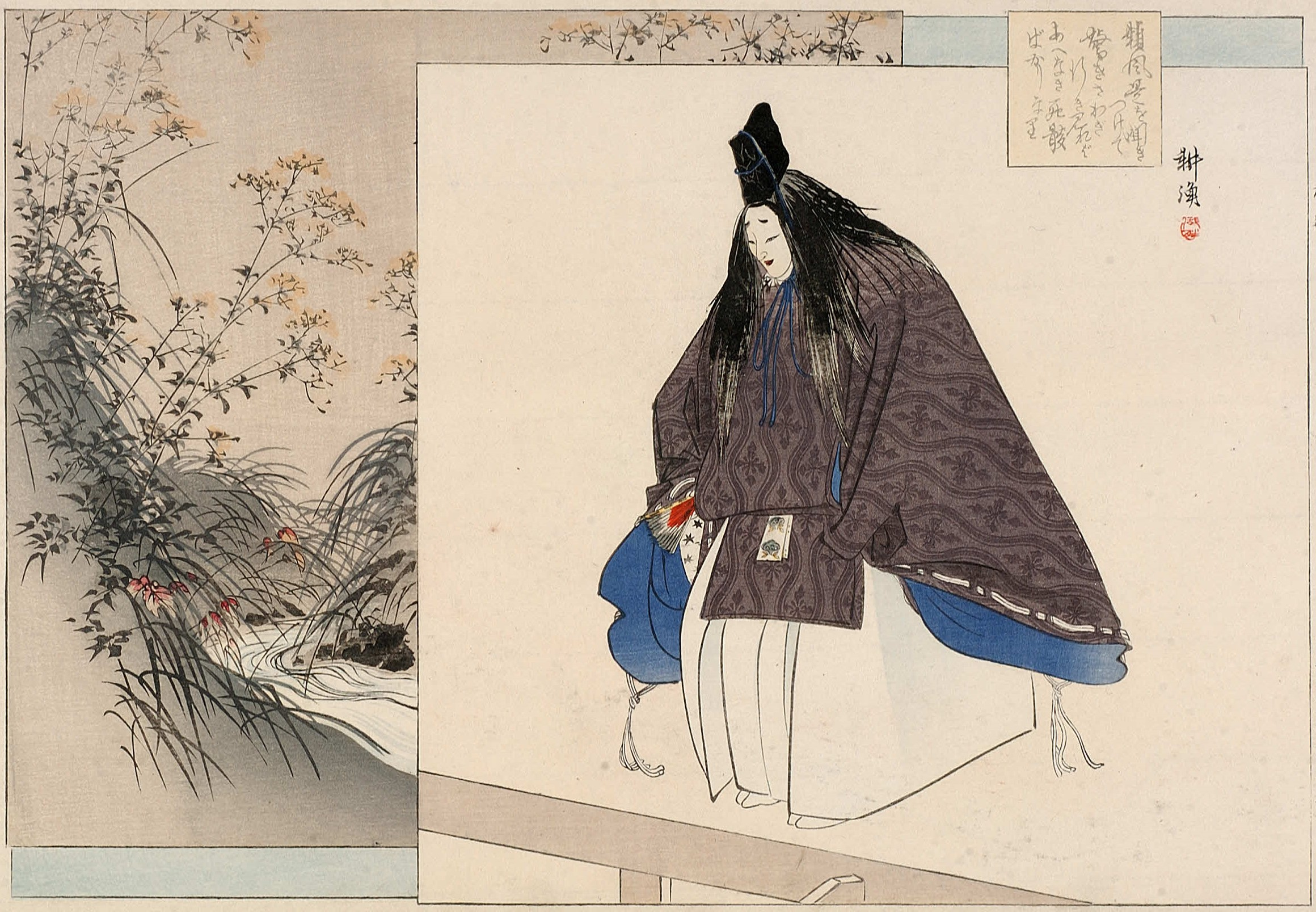 Scene from Nô-drama "Ominaeshi"